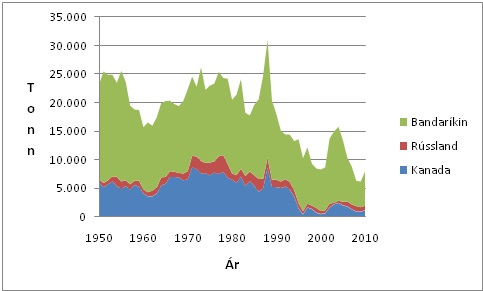 3 stærstu veiðiþjóðir á kóngalaxi frá 1950-2010 samkvæmt FAO